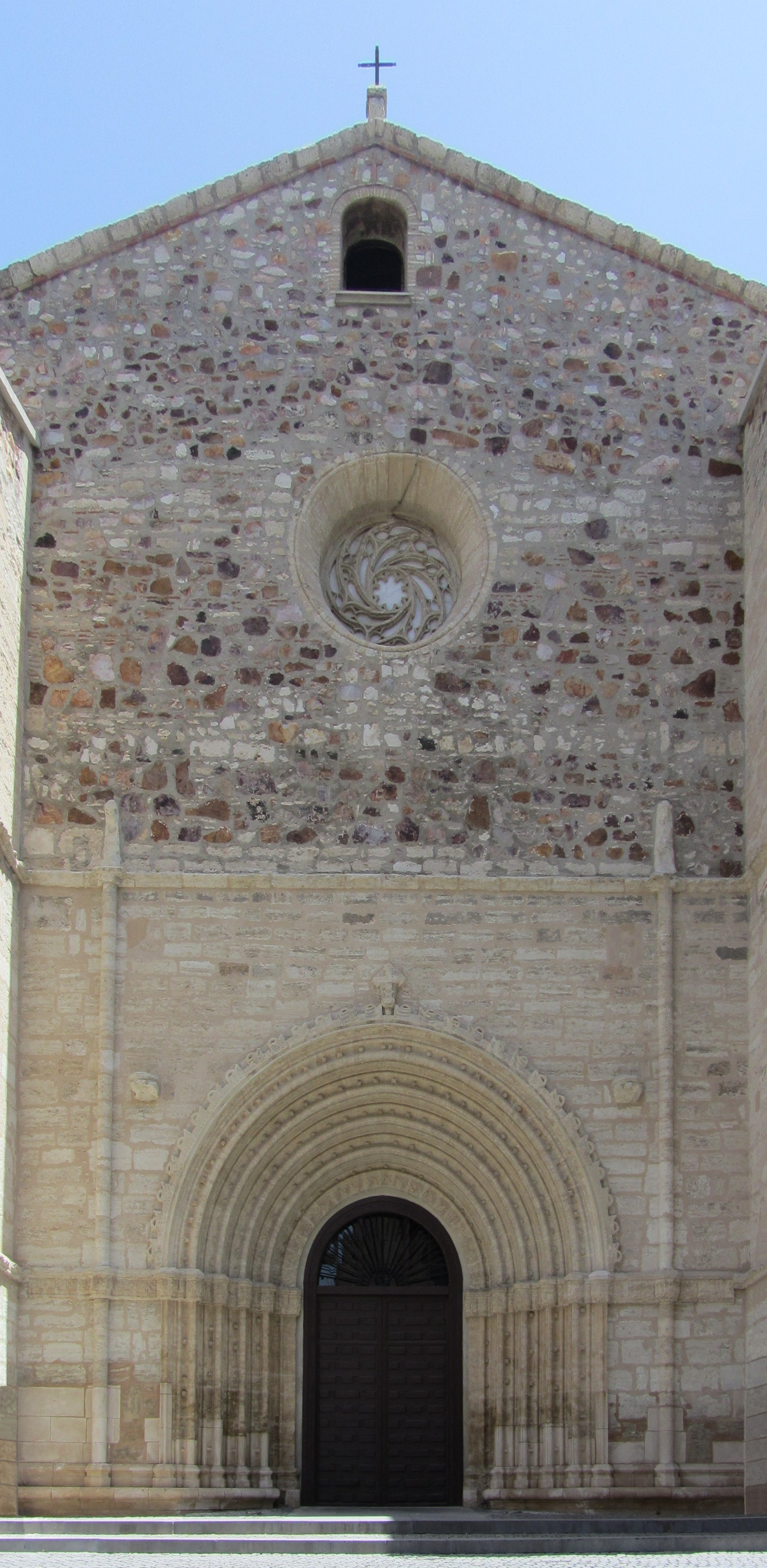 Puerta del Perdón de la Iglesia de San Pedro en Ciudad Real (España) de la segunda mitad del siglo XIV.